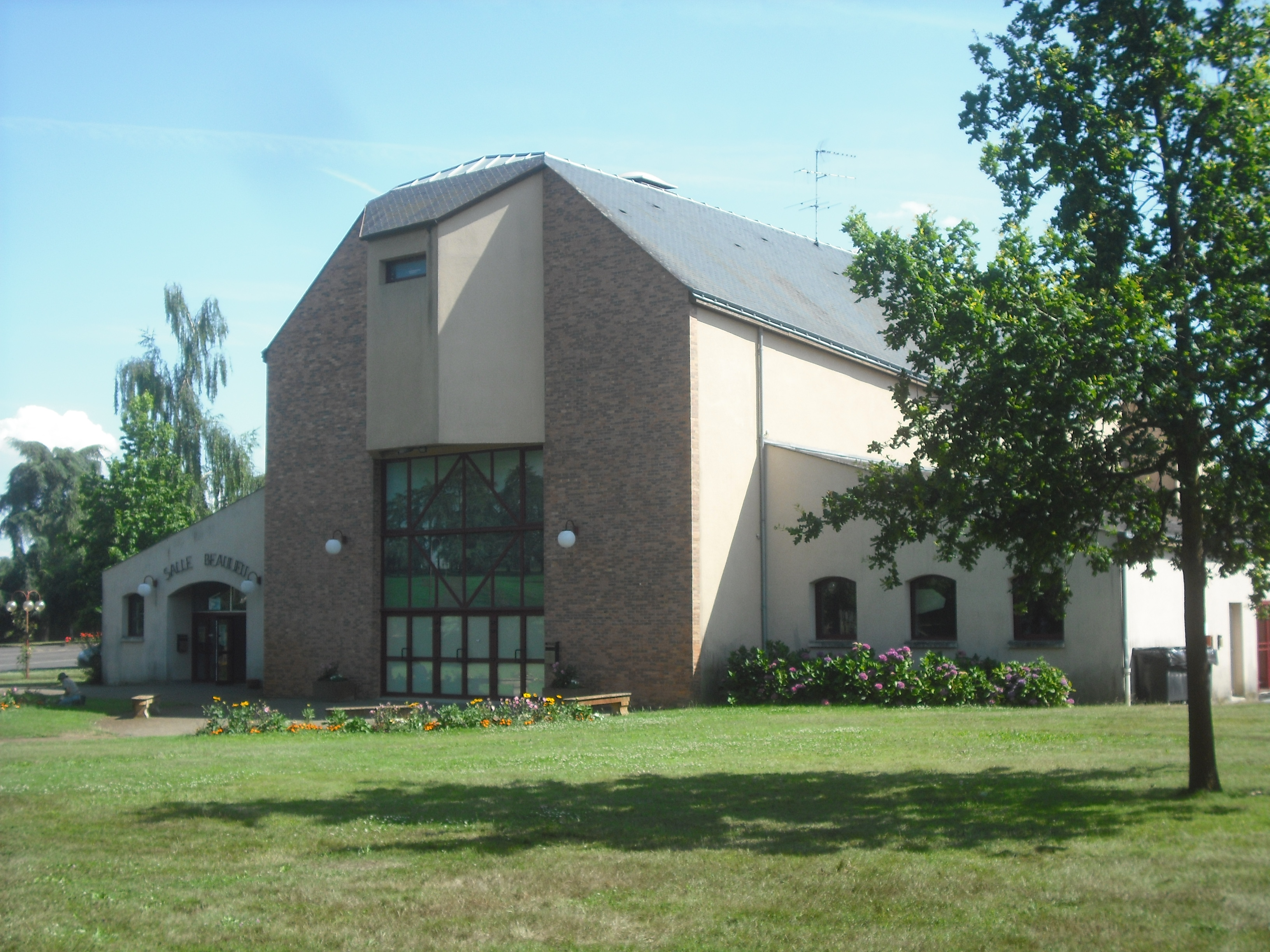 Salle Beaulieu à Candé, Maine-et-Loire, France.